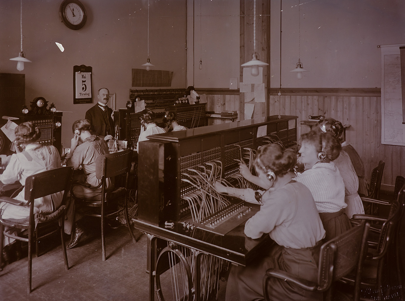 Rikstelefonen i Karl Johans gate 14, Kristiania. Foto: Severin Worm-Petersen. Fra arkivet etter Televerket, Fotosamlingen (S-4820, Serie U, stk. 6_2139).